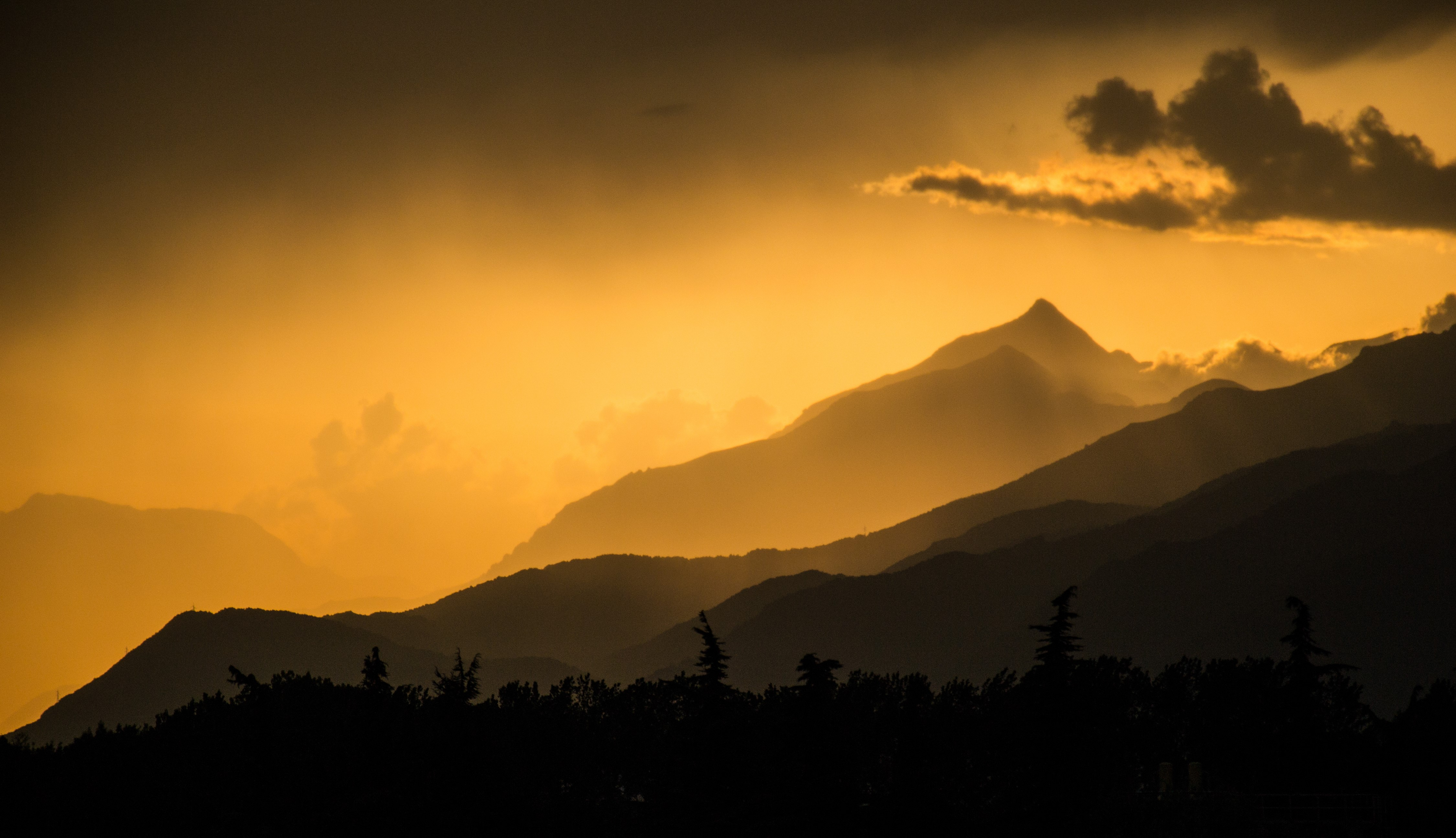 Rocciamelone (Q49964120)